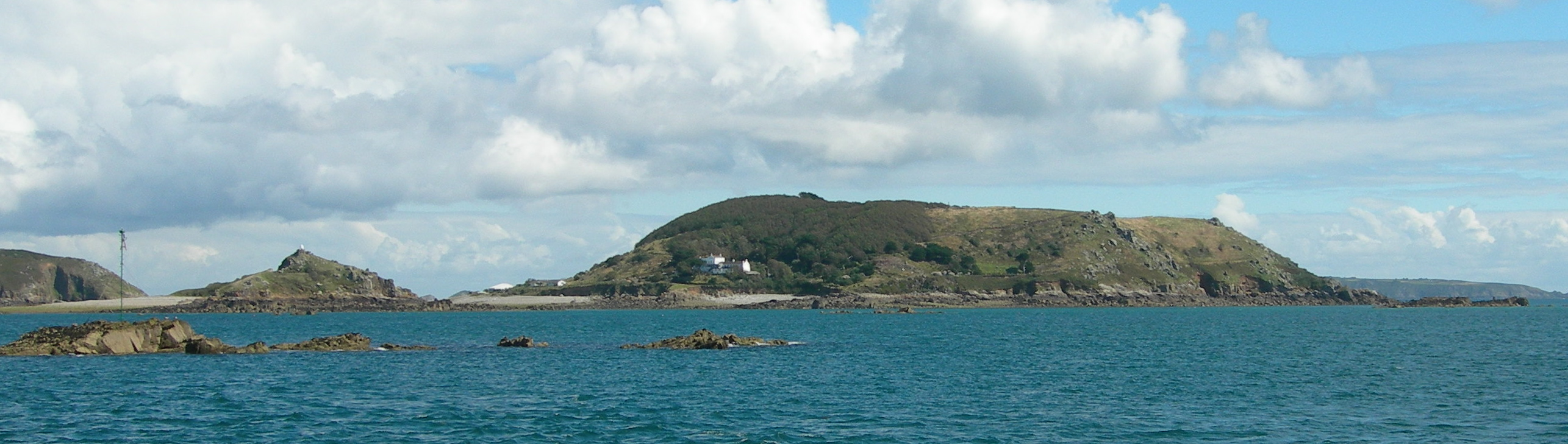 Ile de Jéthou